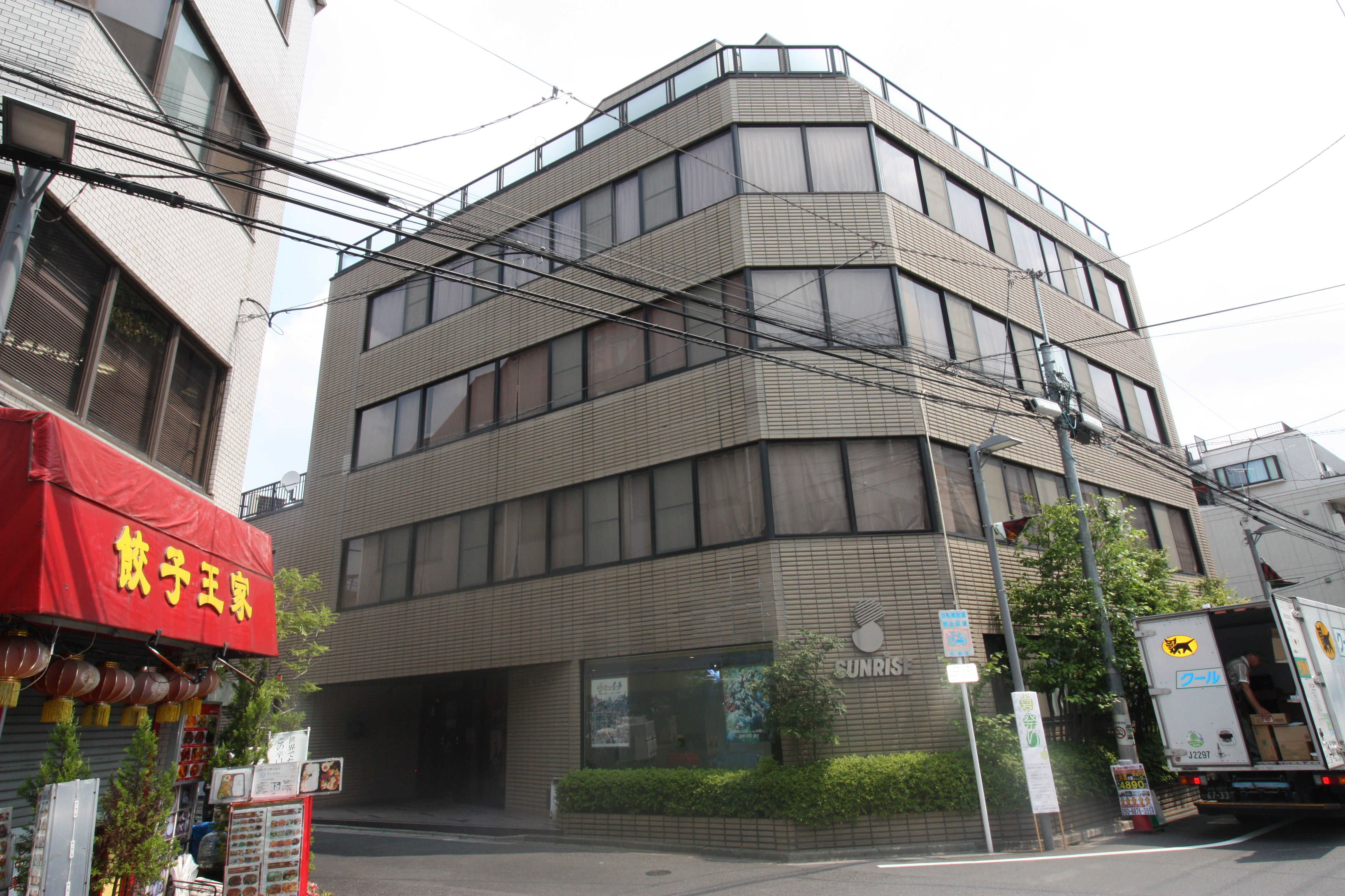 Gli studi della Sunrise nel quartiere di Suginami, Tokyo